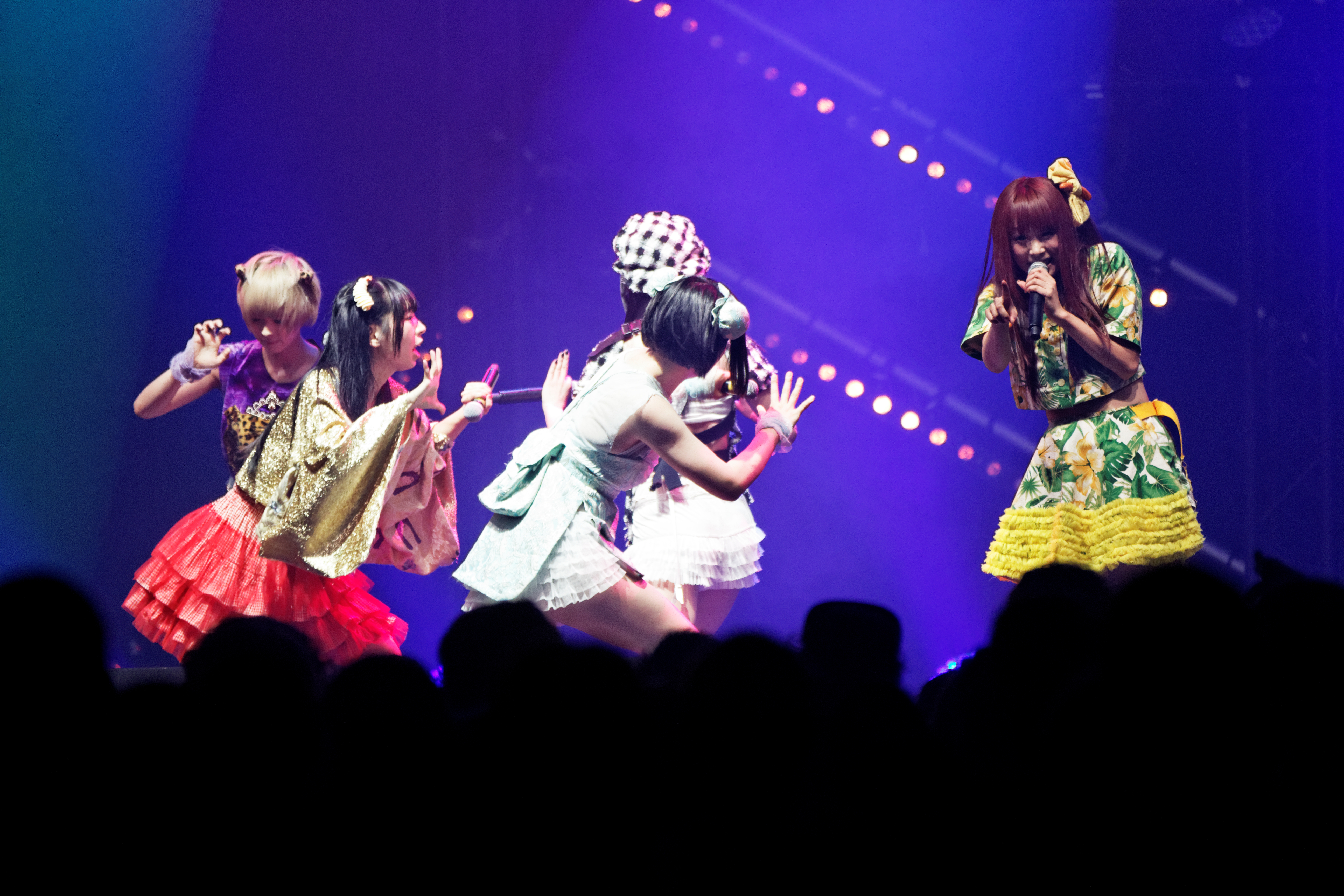 Dempagumi.inc en concert lors du live house du Japan expo Paris 2013.